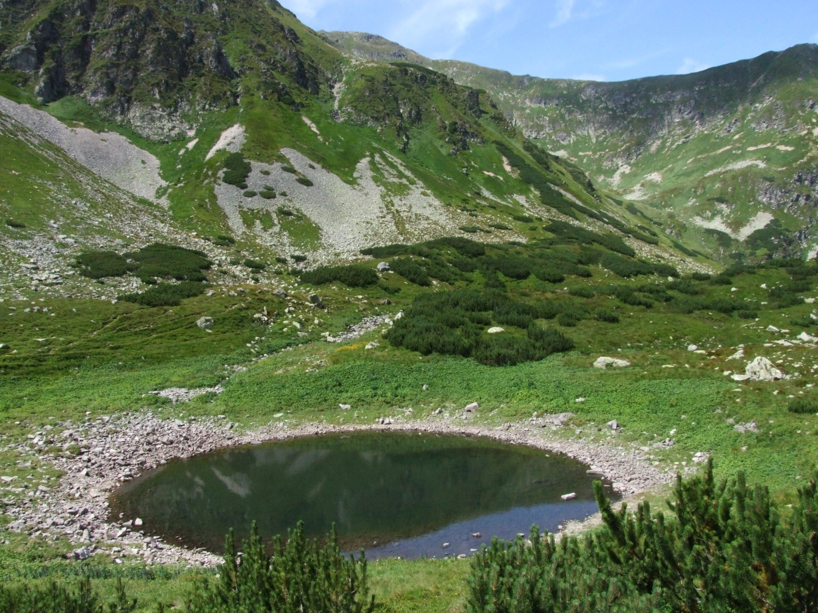 Czarny Staw Raczkowy